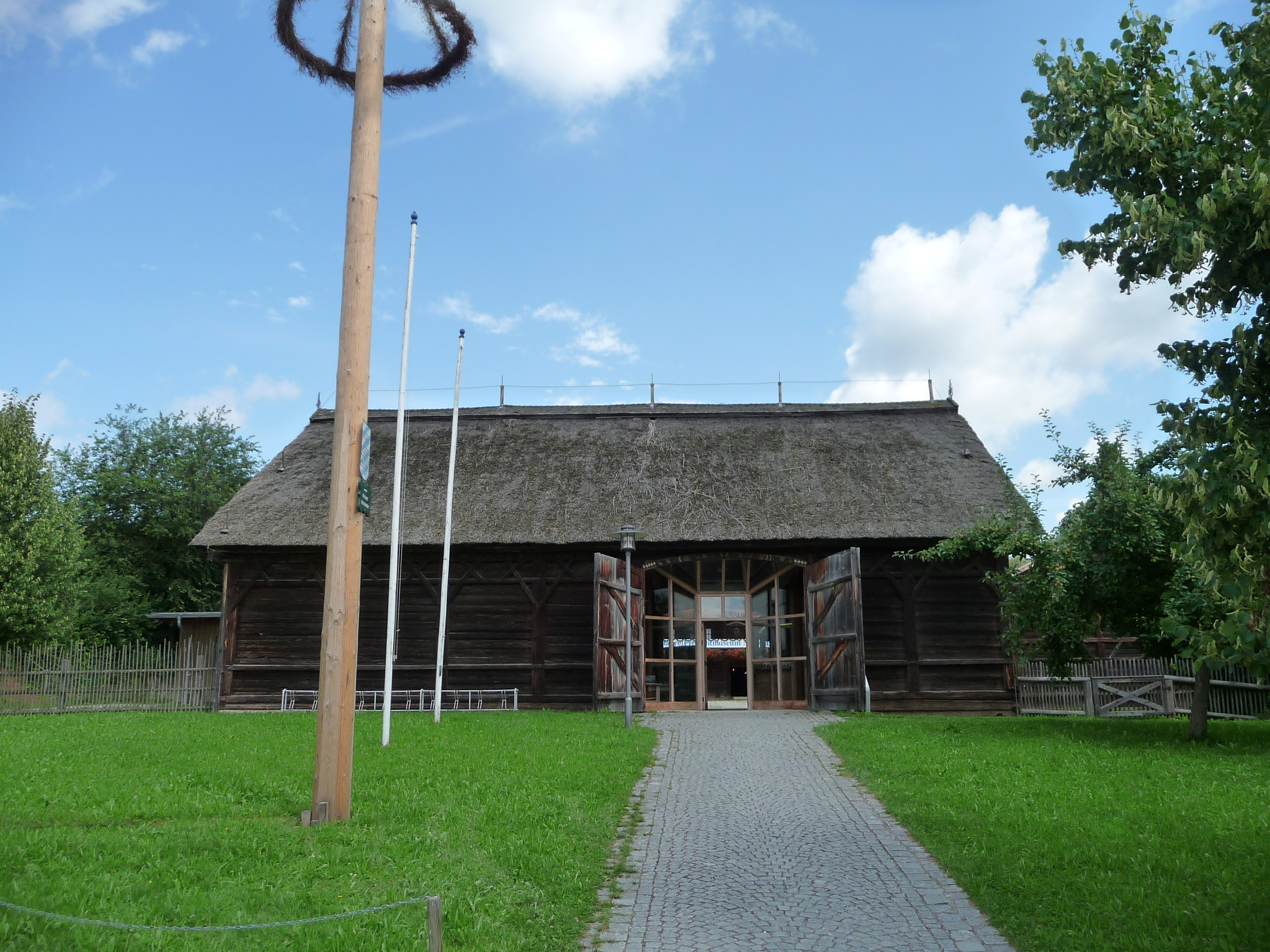 Der Eingang zum Freilichtmuseum in Massing